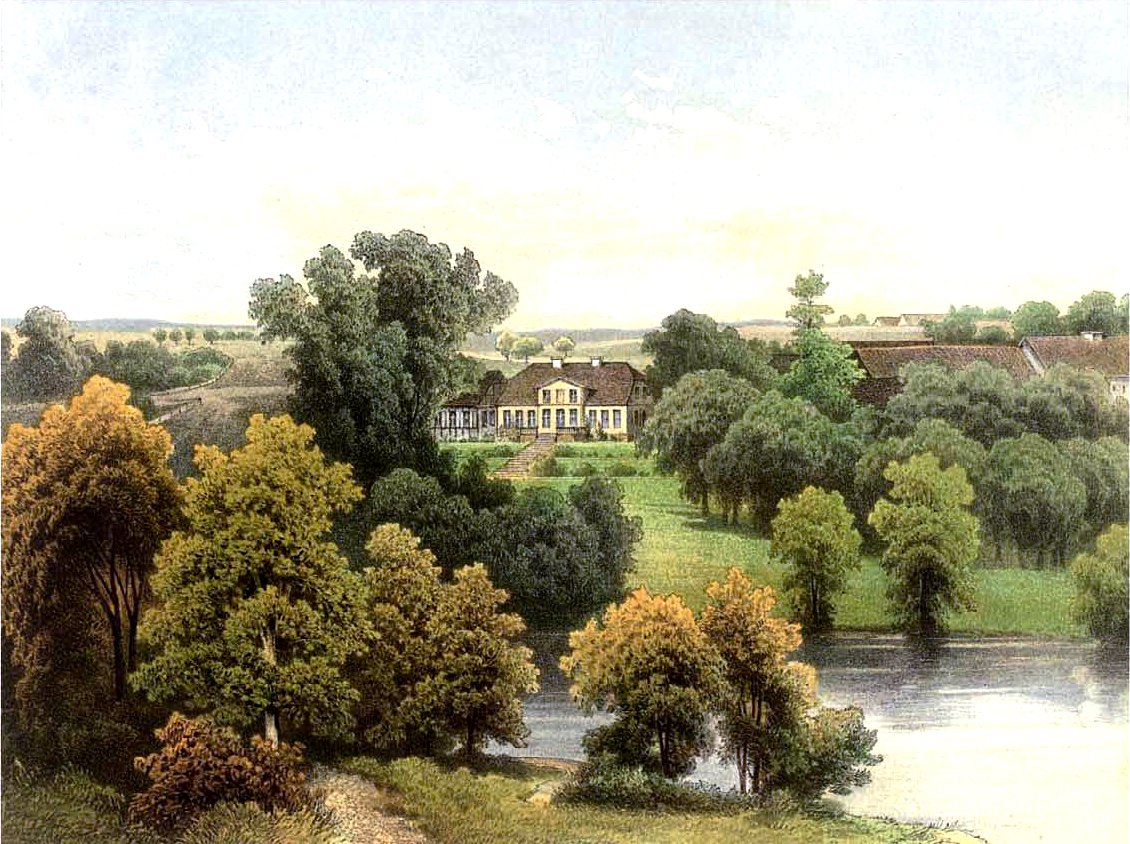 Gut Labehn, Kreis Stolp, Provinz Pommern, Lithografie aus dem 19. Jahrhundert